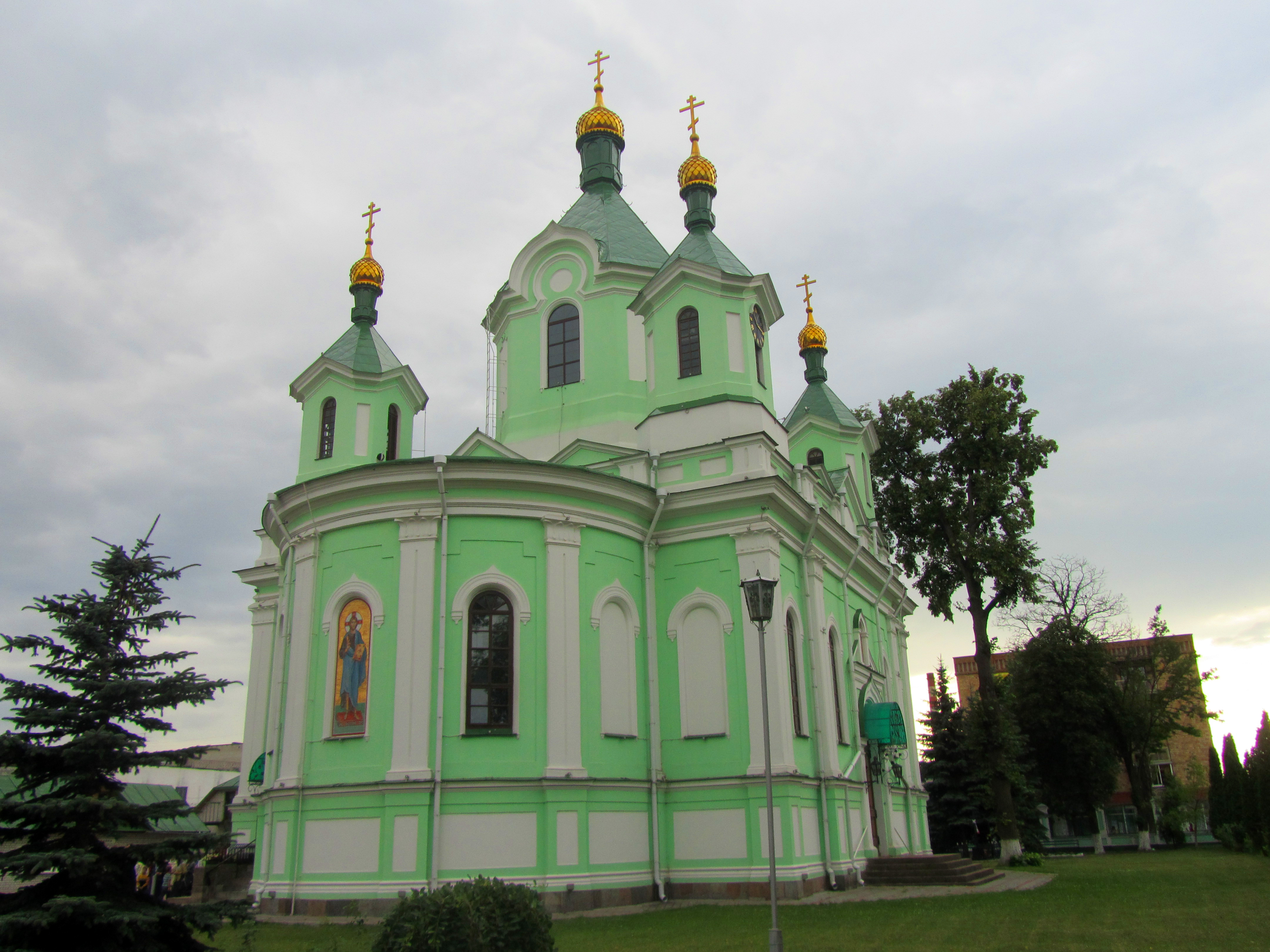 Беларуская (тарашкевіца): Сьвята-Сімяонаўскі сабор. г. Берасьце This is a photo of Belarusian heritage monument. Reference number: 113Г000016 ( WLM)